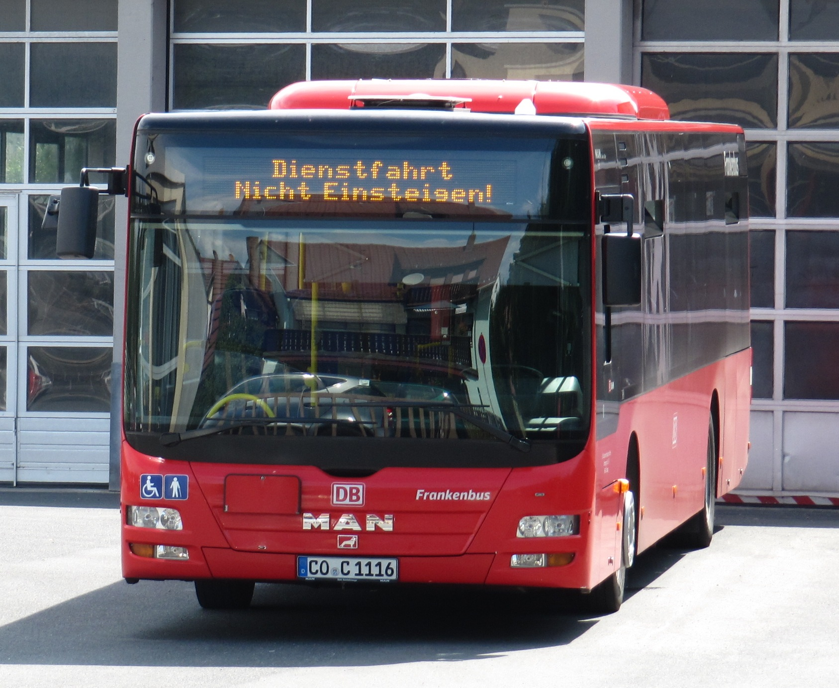 DB Regio Bus Bayern GmbH Wagen 1116